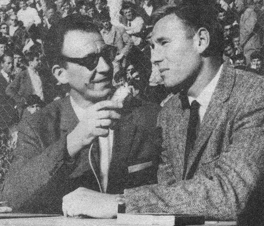 Left-right: Mladen Delić and Nikola Pilić